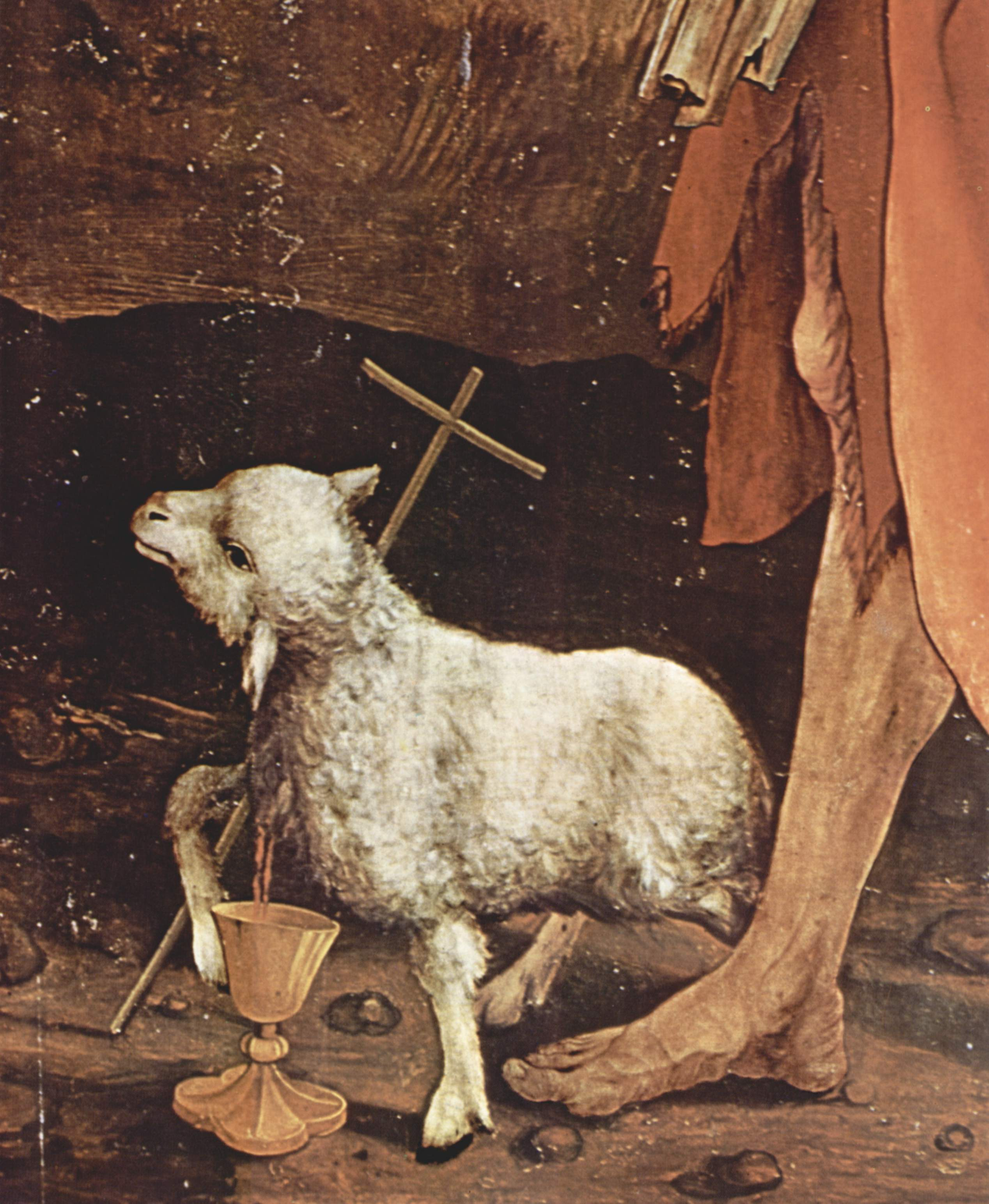 detail: Hl. Johannes der Täufer